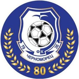 Эмблема футбольной команды «Черномо́рец» (Одесса), посвящённая 80-й годовщине клуба.